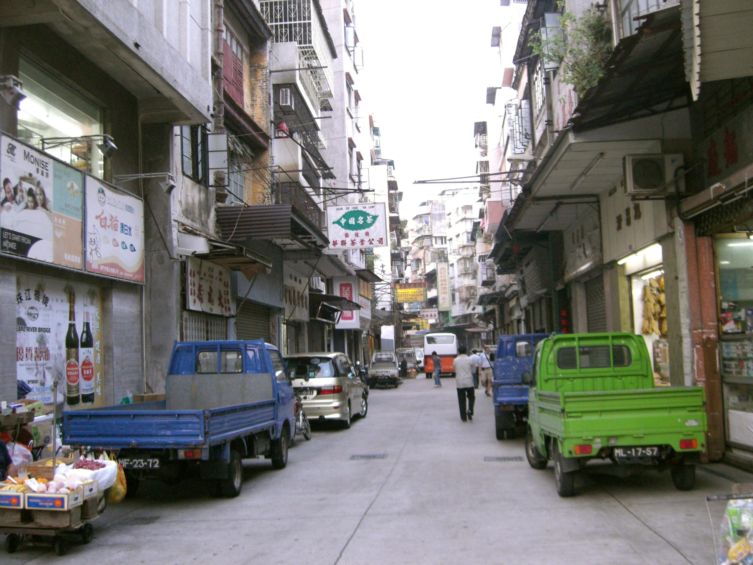 Rua de Cinco de Outubro